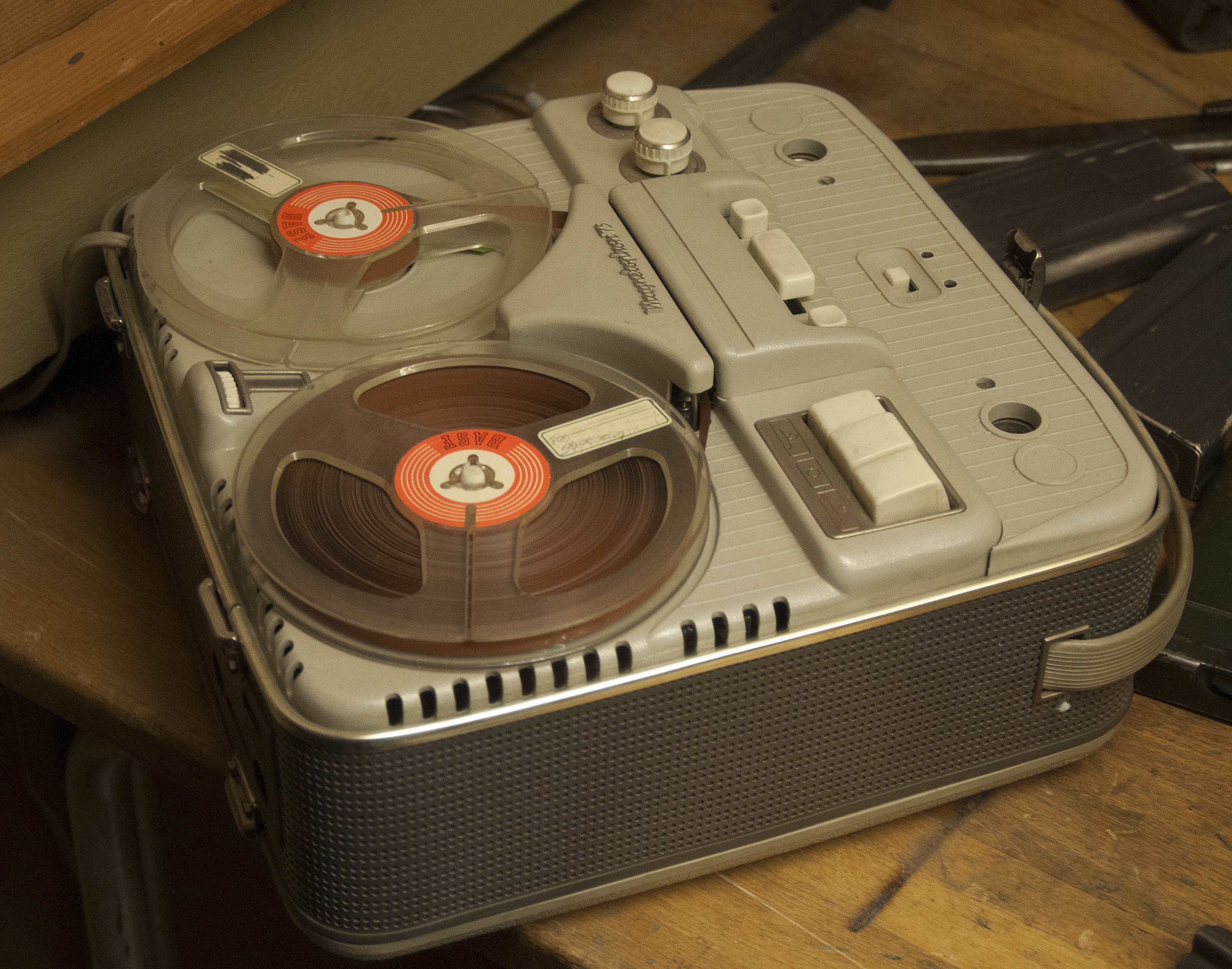 AEG - Magnetophon 75 in het National Museum of Military History in Diekirch